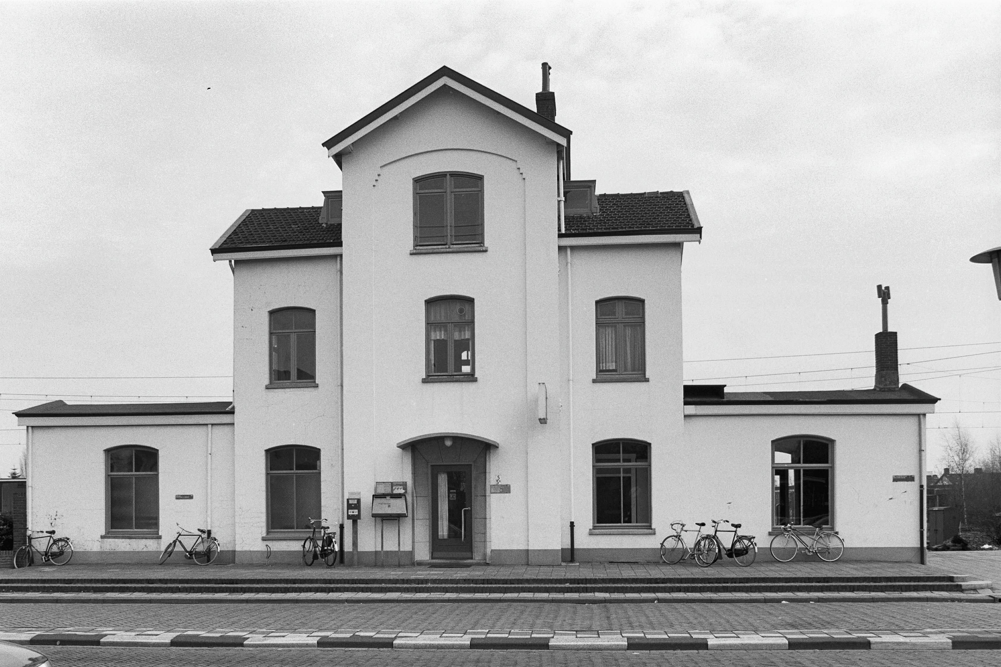 Station: Exterieur OVERZICHT VOORGEVEL